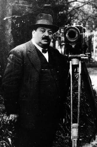 Fotografía de Mario Gallo